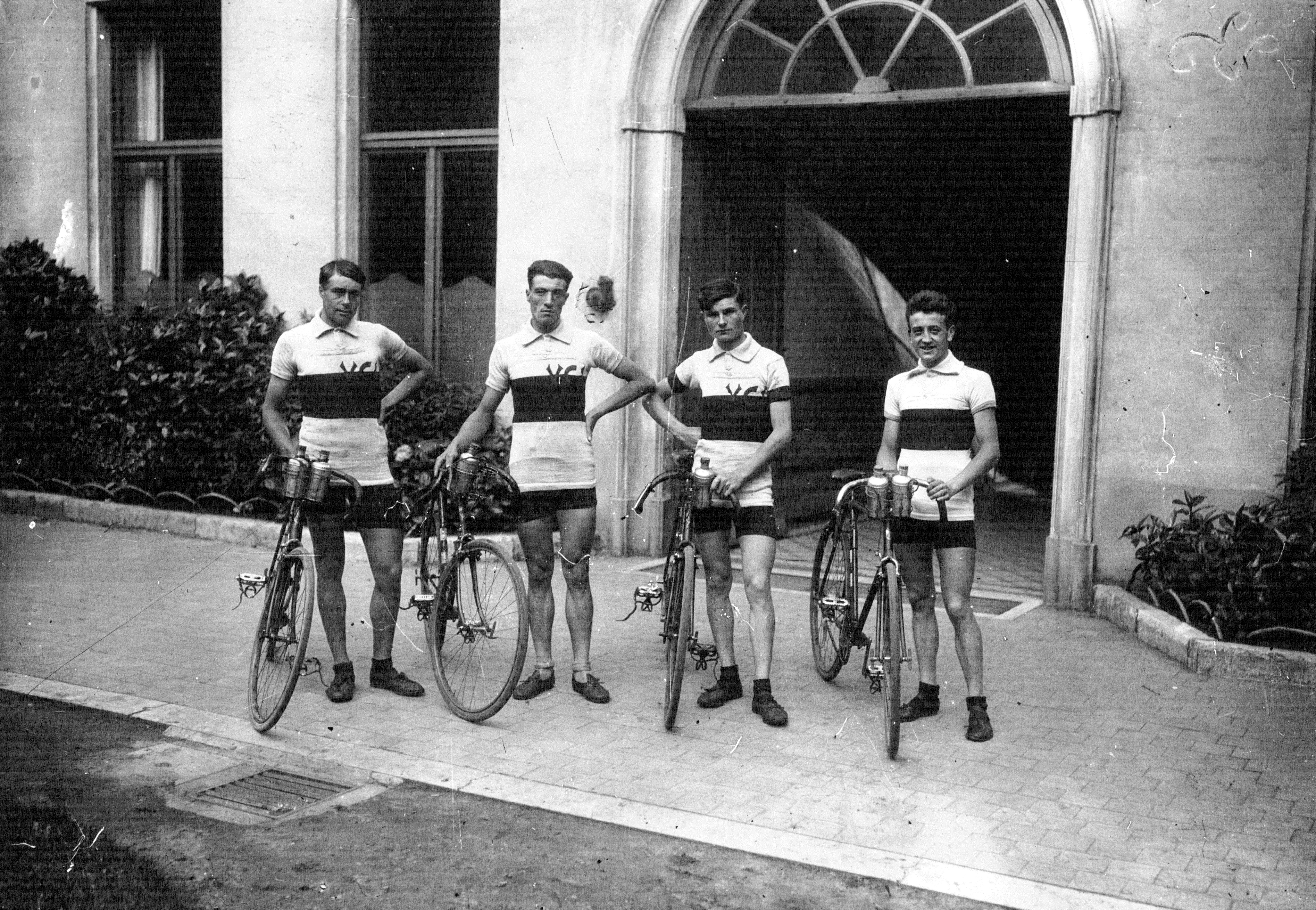 VIIe Olympiades à Anvers : l'équipe française gagnant la course sur route des 170 km : de gauche à droite Canteloube, Detreille, Souchard, Gobillot : [photographie de presse] / Agence Meurisse.